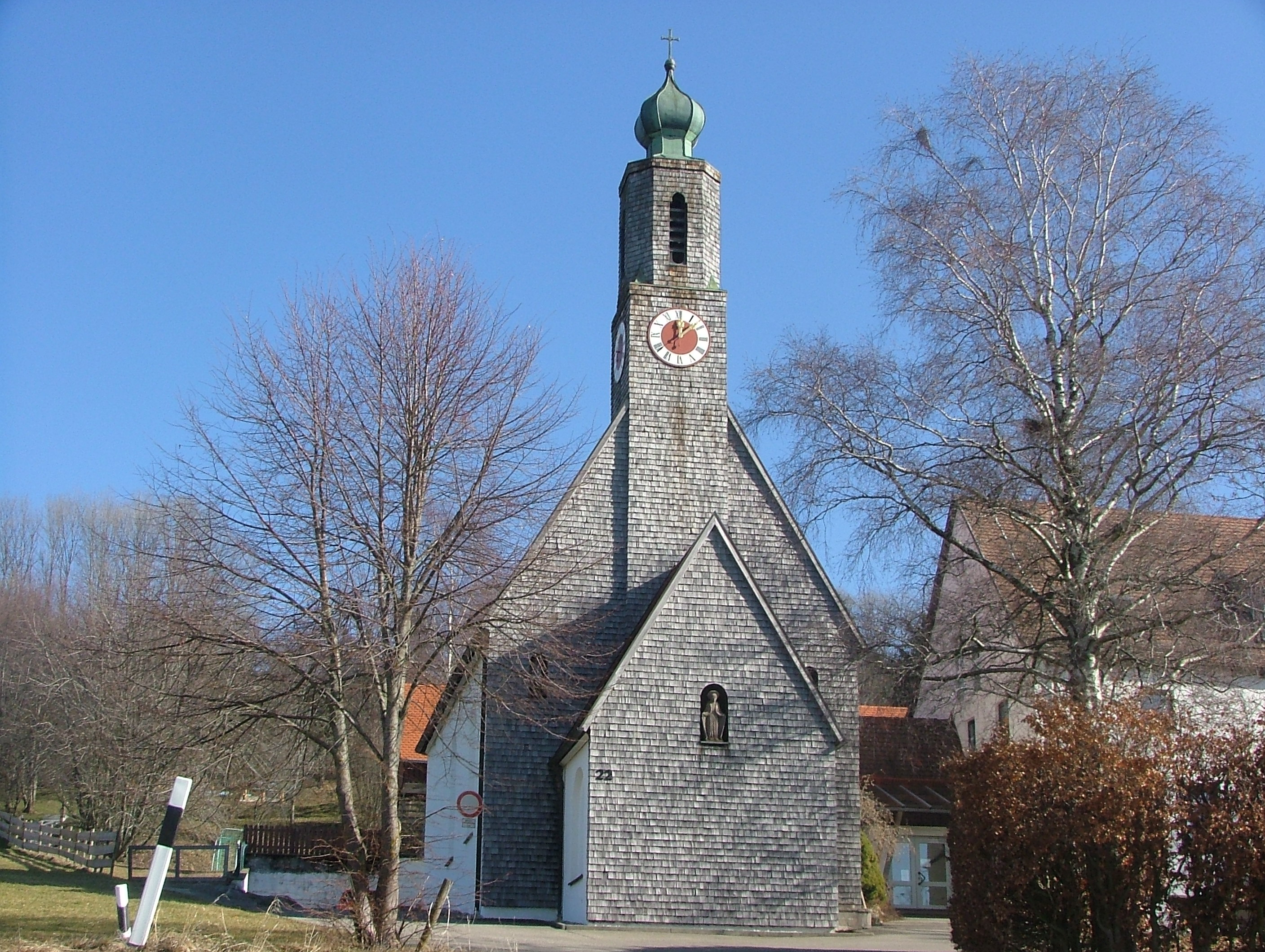 Kapelle der ehemaligen Schule Waldmühle